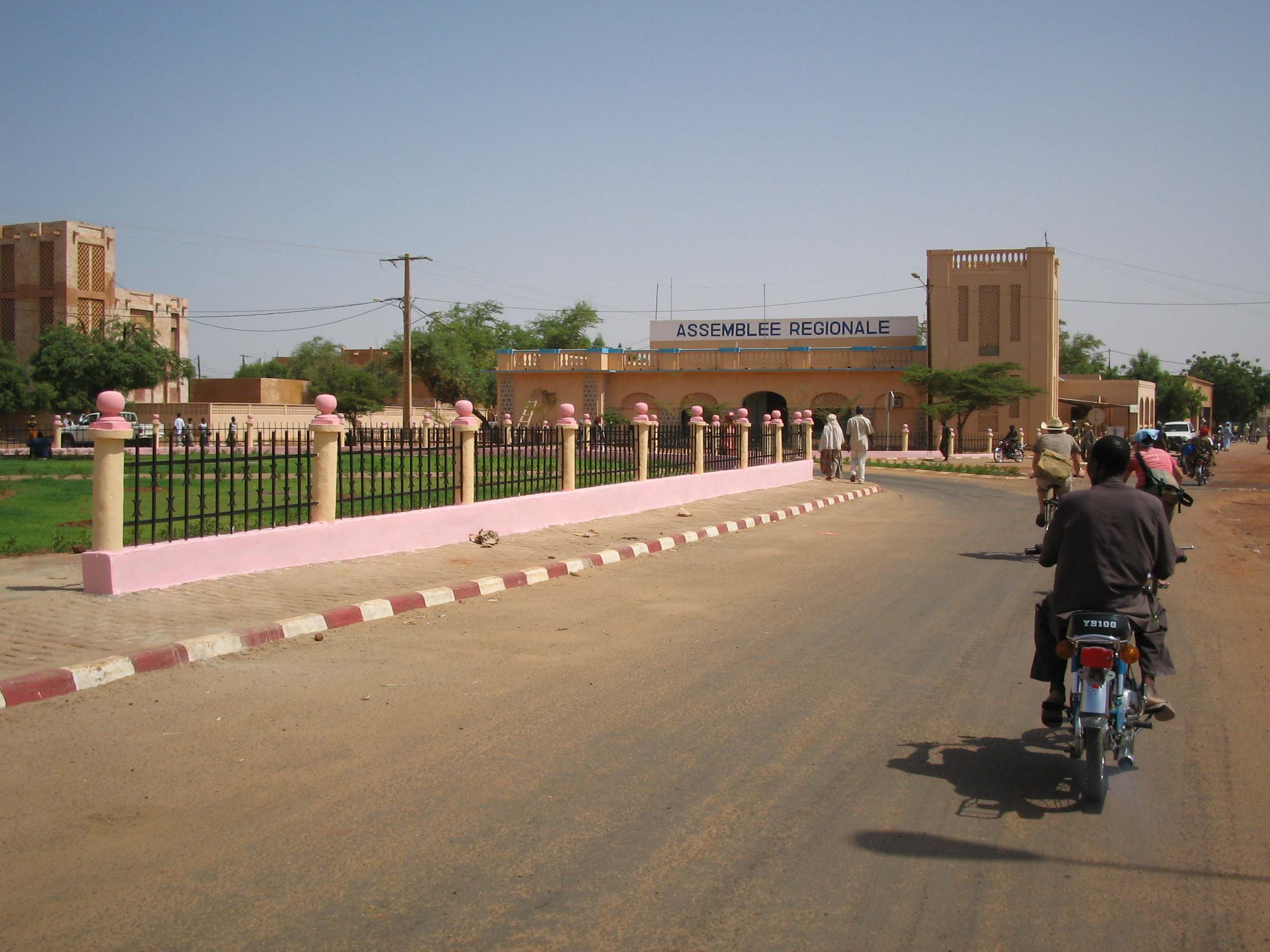 Gao, Mali